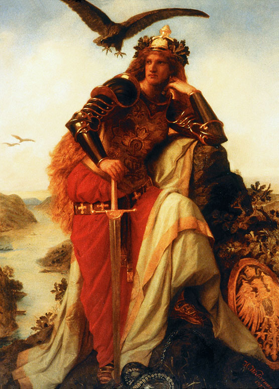 Germania auf der Wacht am Rhein (1873) von Hermann Wislicenus (1825-1899)